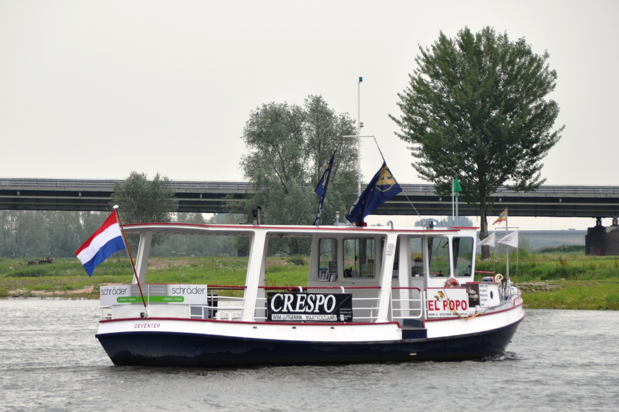 Het voetveer STOKVIS tussen Deventer De Welle en De Worp